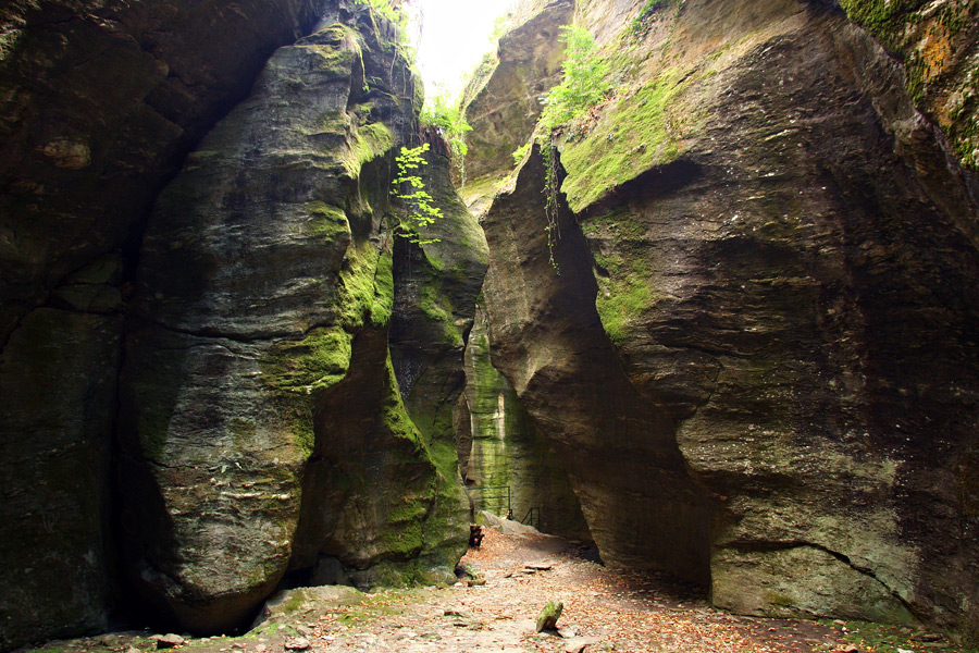 Scorcio dell'Orrido Sud, Orridi di Uriezzo, Premia (VB)